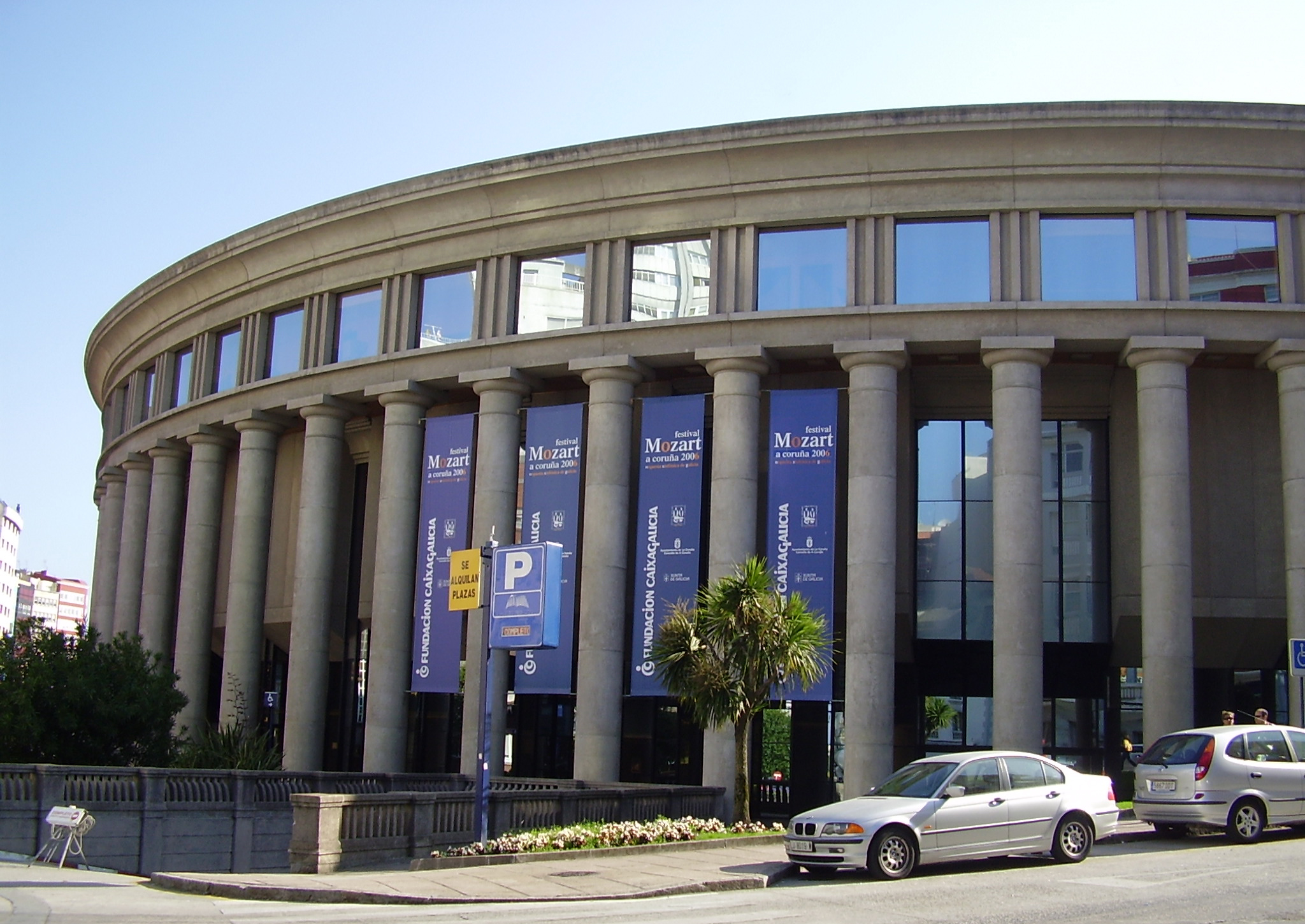 Palacio de la ópera de La Coruña